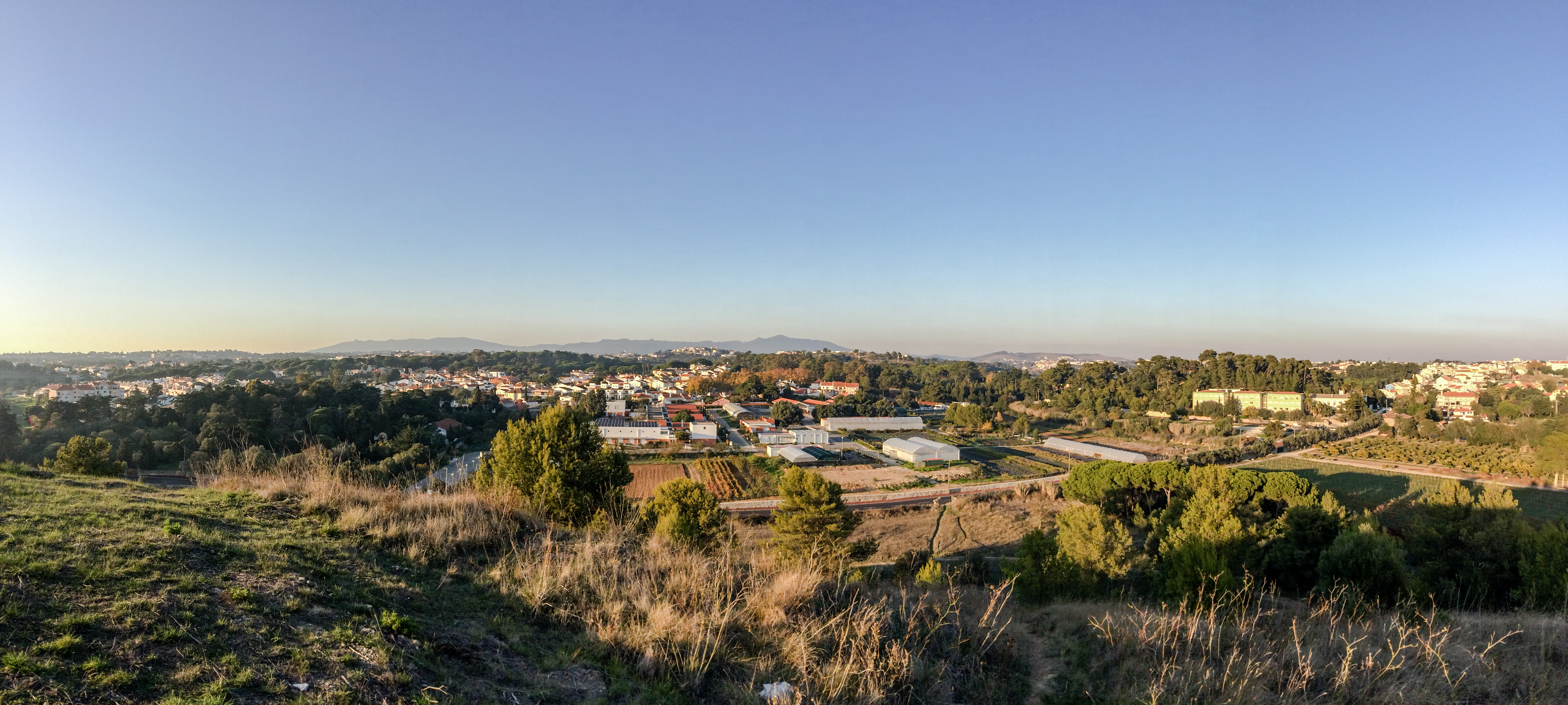 Panorâmica das zonas da Alapraia, Livramento e Caparide do Monte do Cabeço Gordo. Ao fundo a Serra de Sintra.